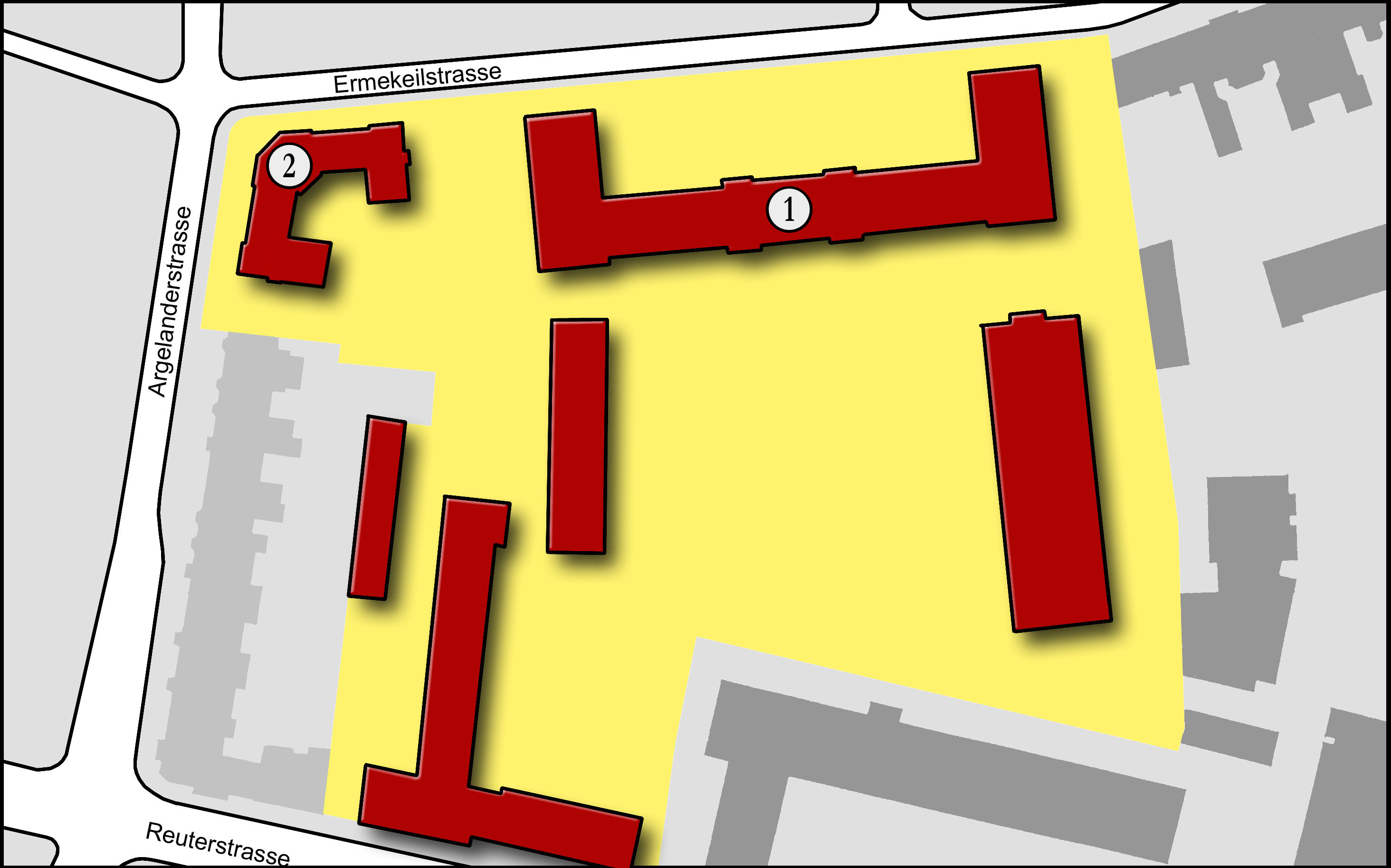 Aktueller Bebauungsplan der Bonner Ermekeilkaserne - 2006